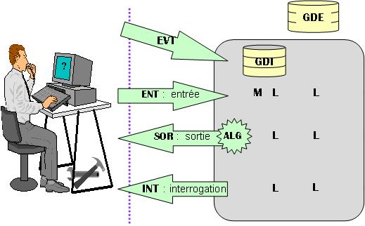 Schema Points de Fonction